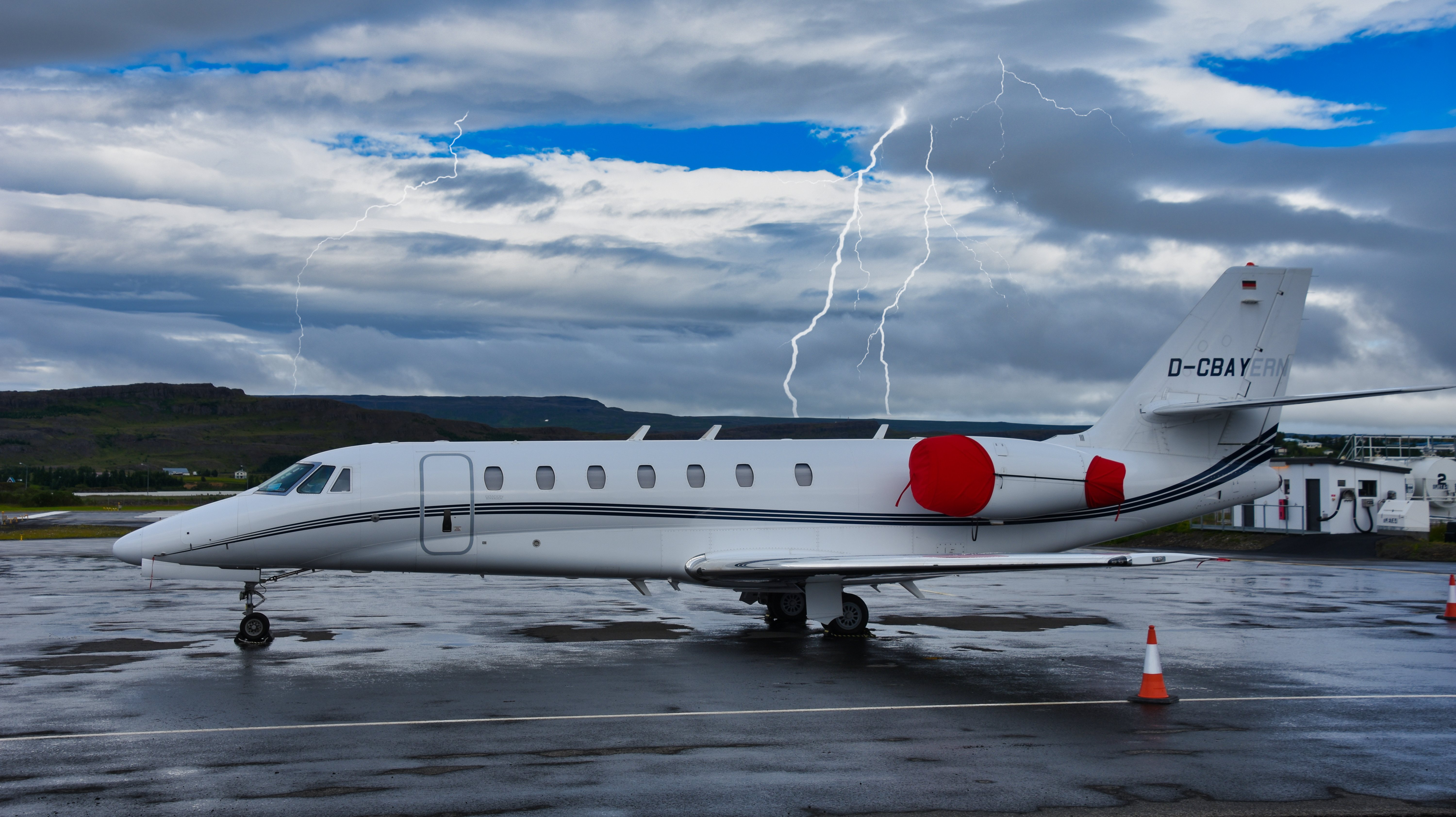 Cessna Citation Sovereign von Eisele Flugdienst am Flughafen Eglisstadir